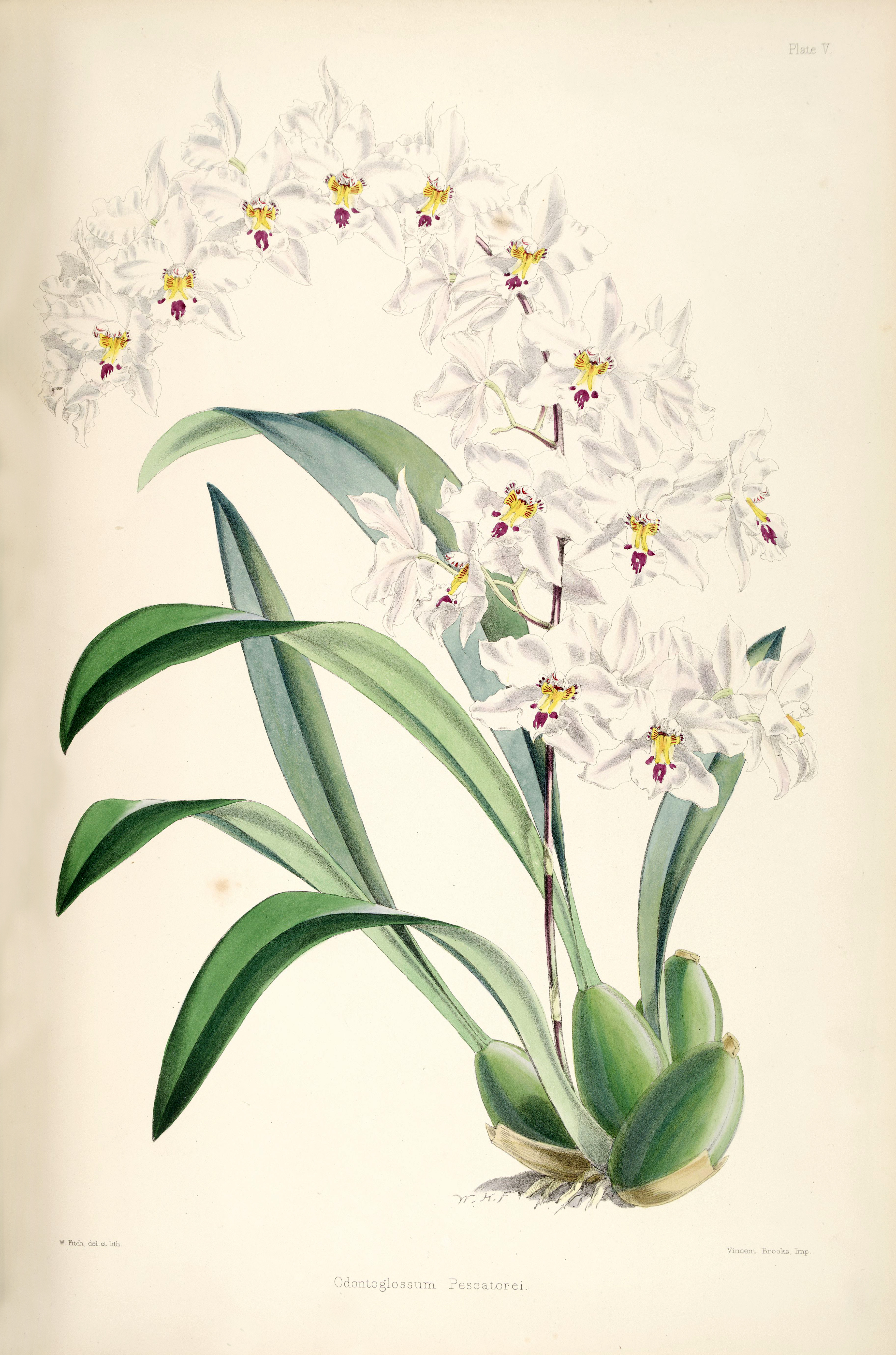 Illustration of Odontoglossum nobile (as syn. Odontoglossum pescatorei)